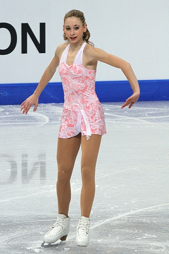 Ленаэль Гийерон-Горри (Франция) на чемпионате мира по фигурному катанию среди юниоров 2012